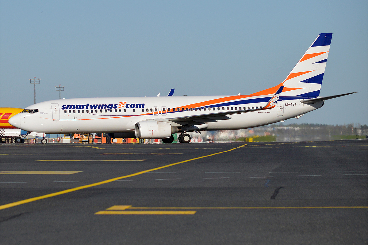 SmartWings, SP-TVZ, Boeing 737-8BK